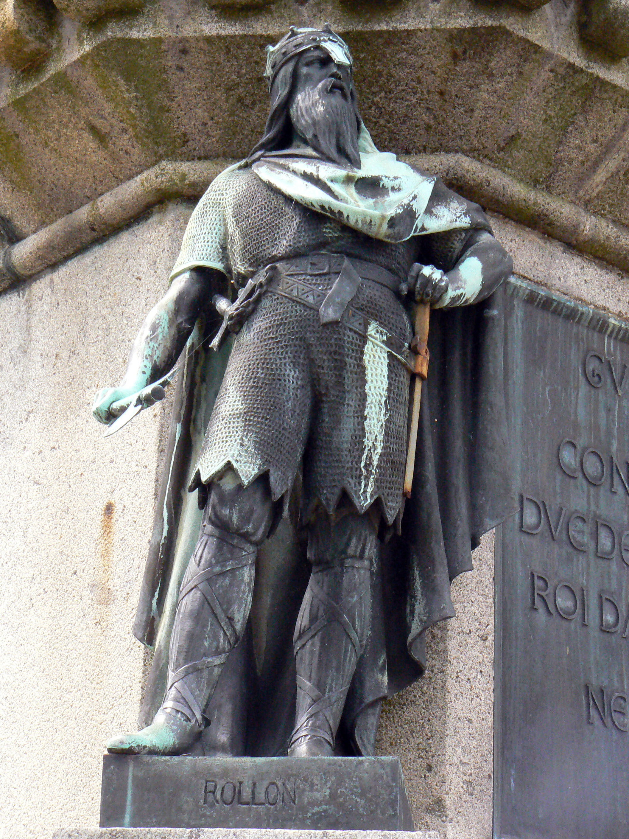 Rollon, premier duc de Normandie de 911 à 927 (ou 933). Monument représentant Guillaume le Conquérant et les six ducs de Normandie l'ayant précédé, Falaise (Calvados, Basse-Normandie).